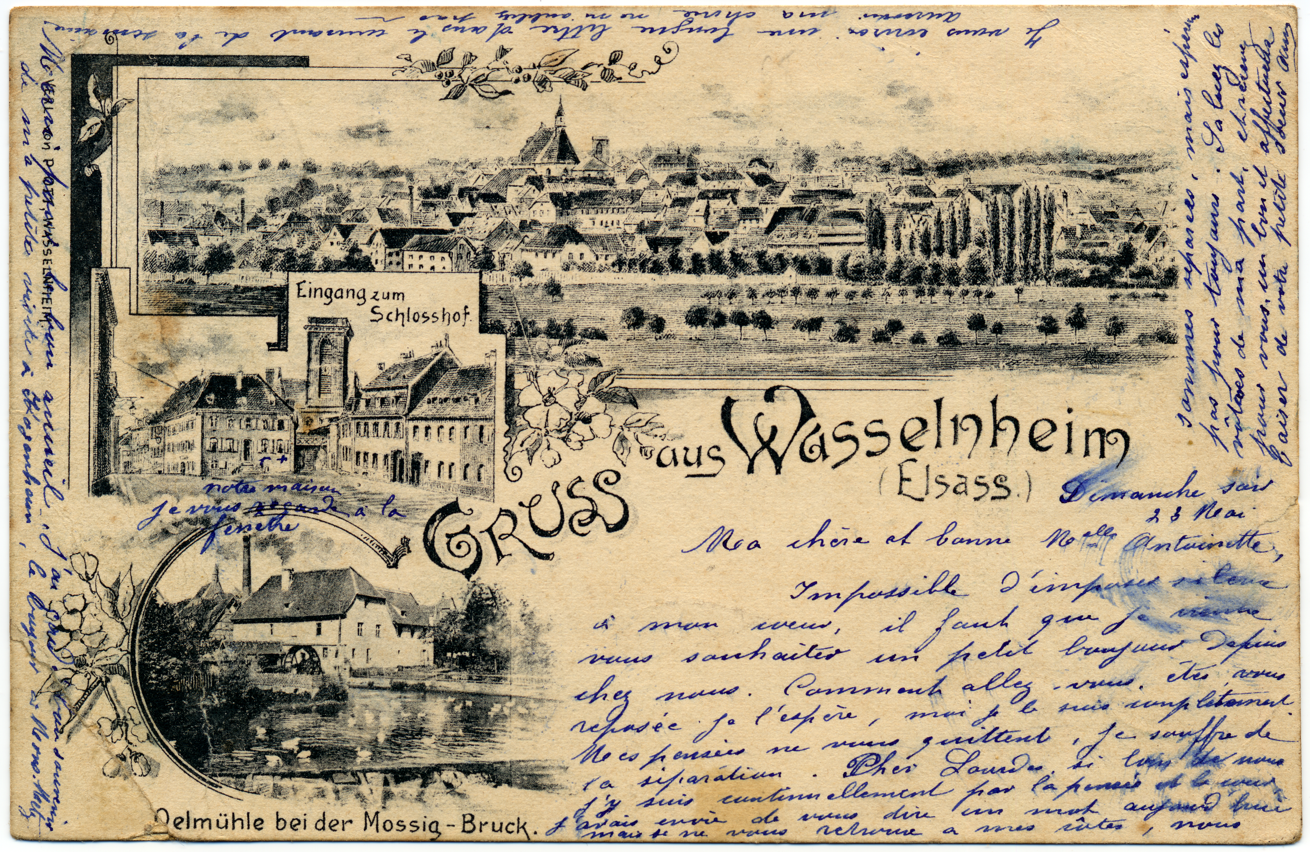 Grüss aus Wasslenheim - Bons baisers de Wasselonne, vers 1872.